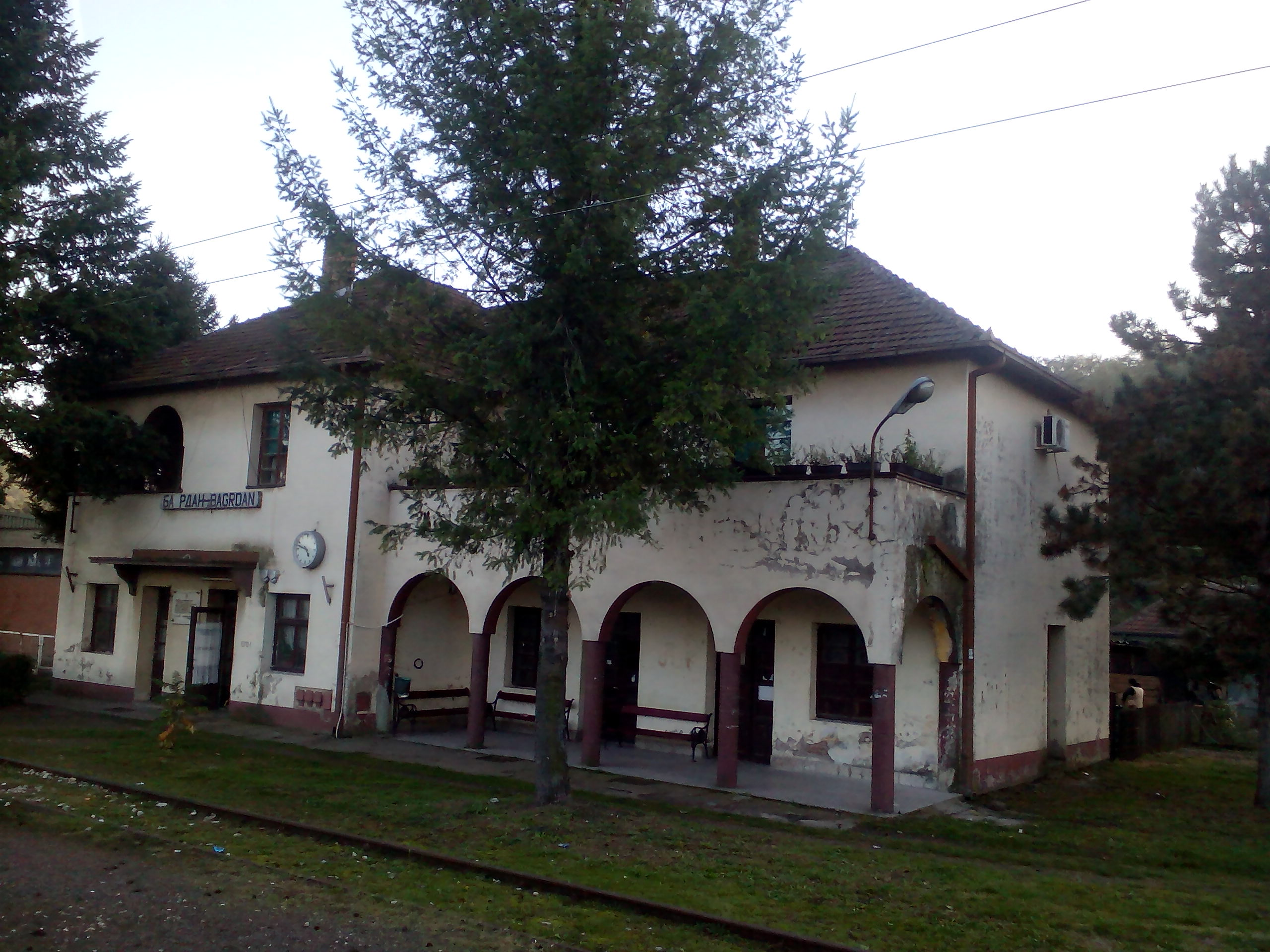 Зграда железничке станице у Багрдану на којој се налази спомен плоча. Аутор фотографије је Иван Миловановић